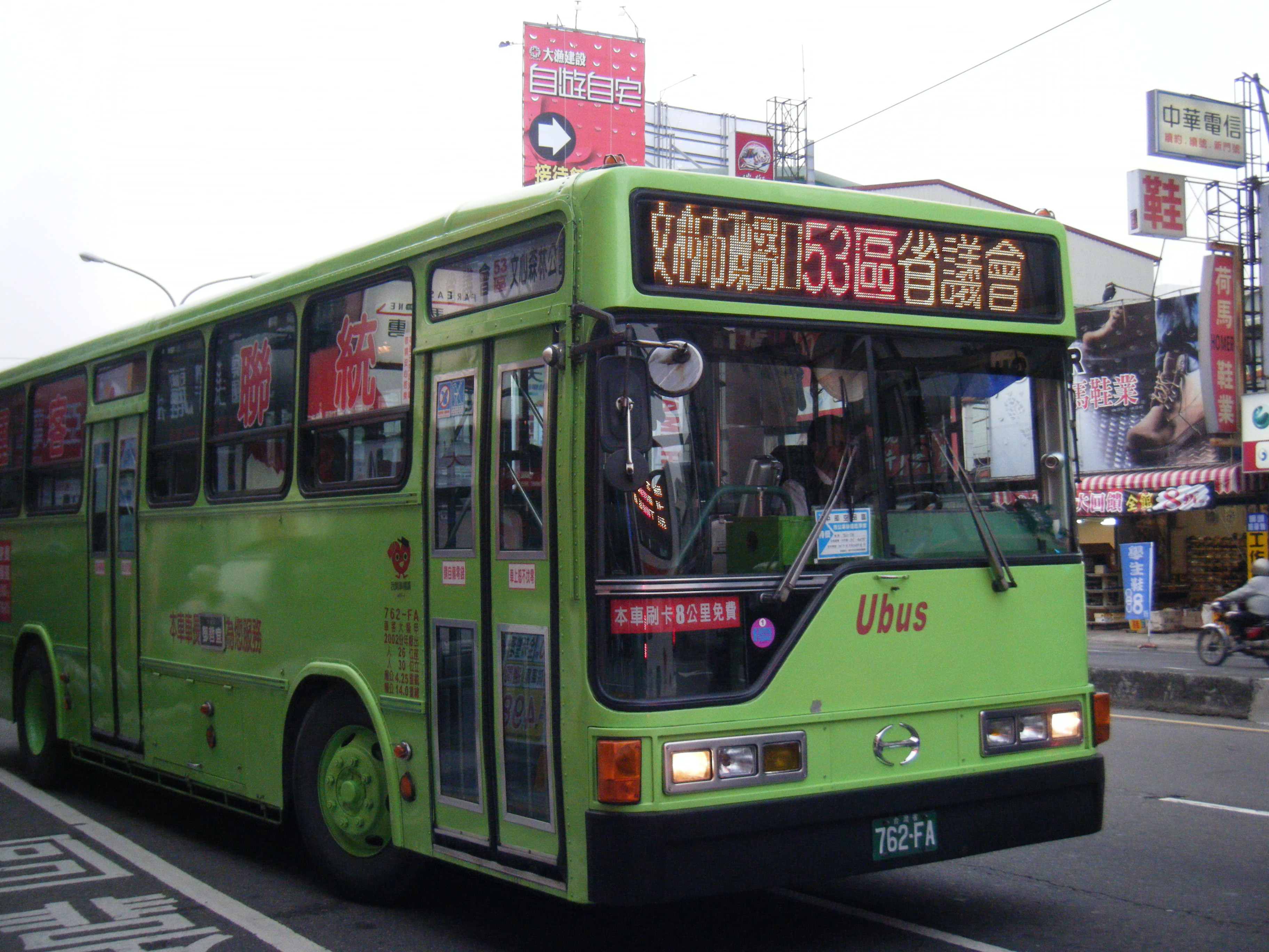 中文（台灣）: 統聯客運762-FA營運台中市公車53路區間車，行駛於台中市大里區中興路一段